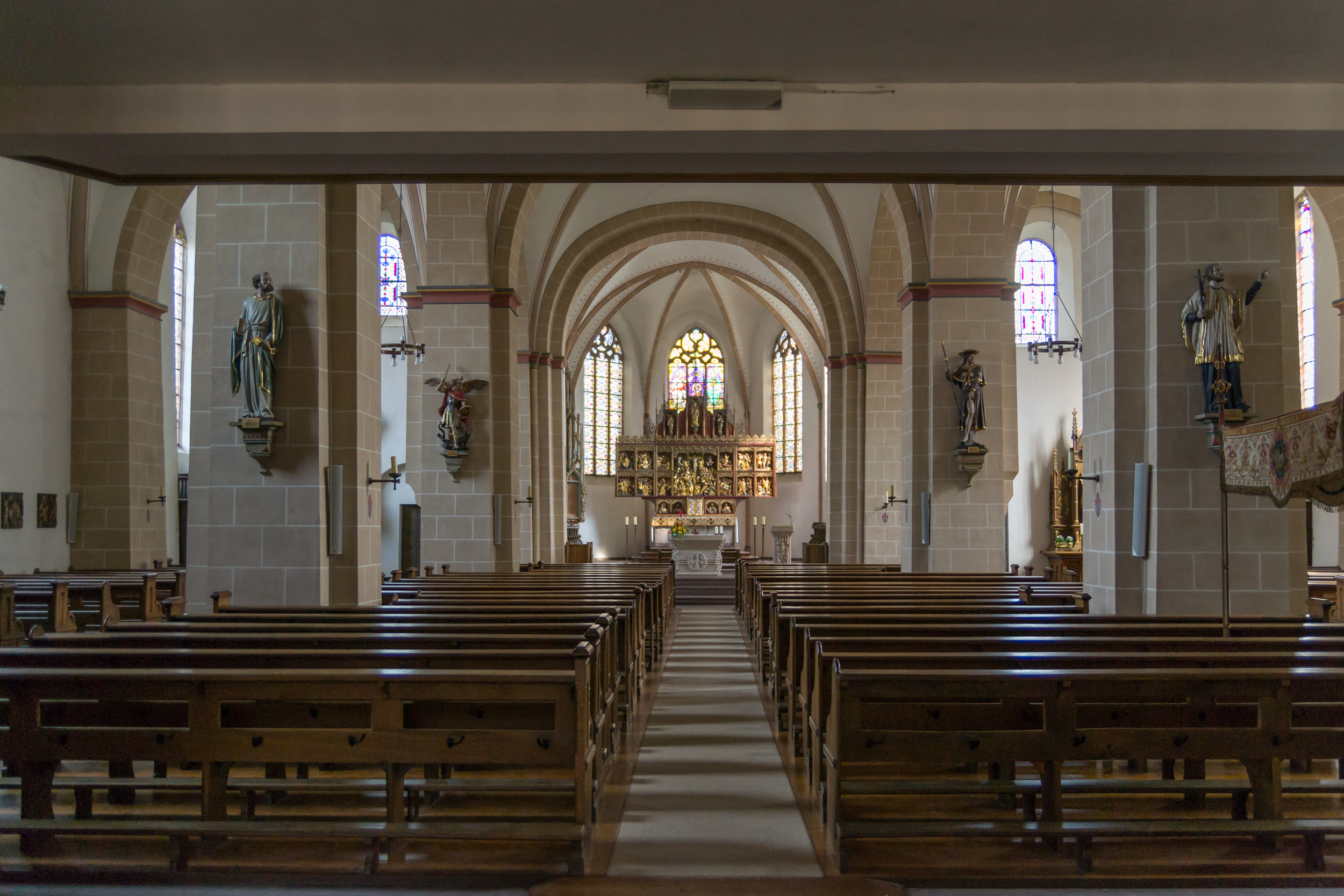 This image shows a heritage building in Germany, located in the North Rhine-Westphalian city Steinheim (Westfalen) (no. 4). Katholische Pfarrkirche St. Marien